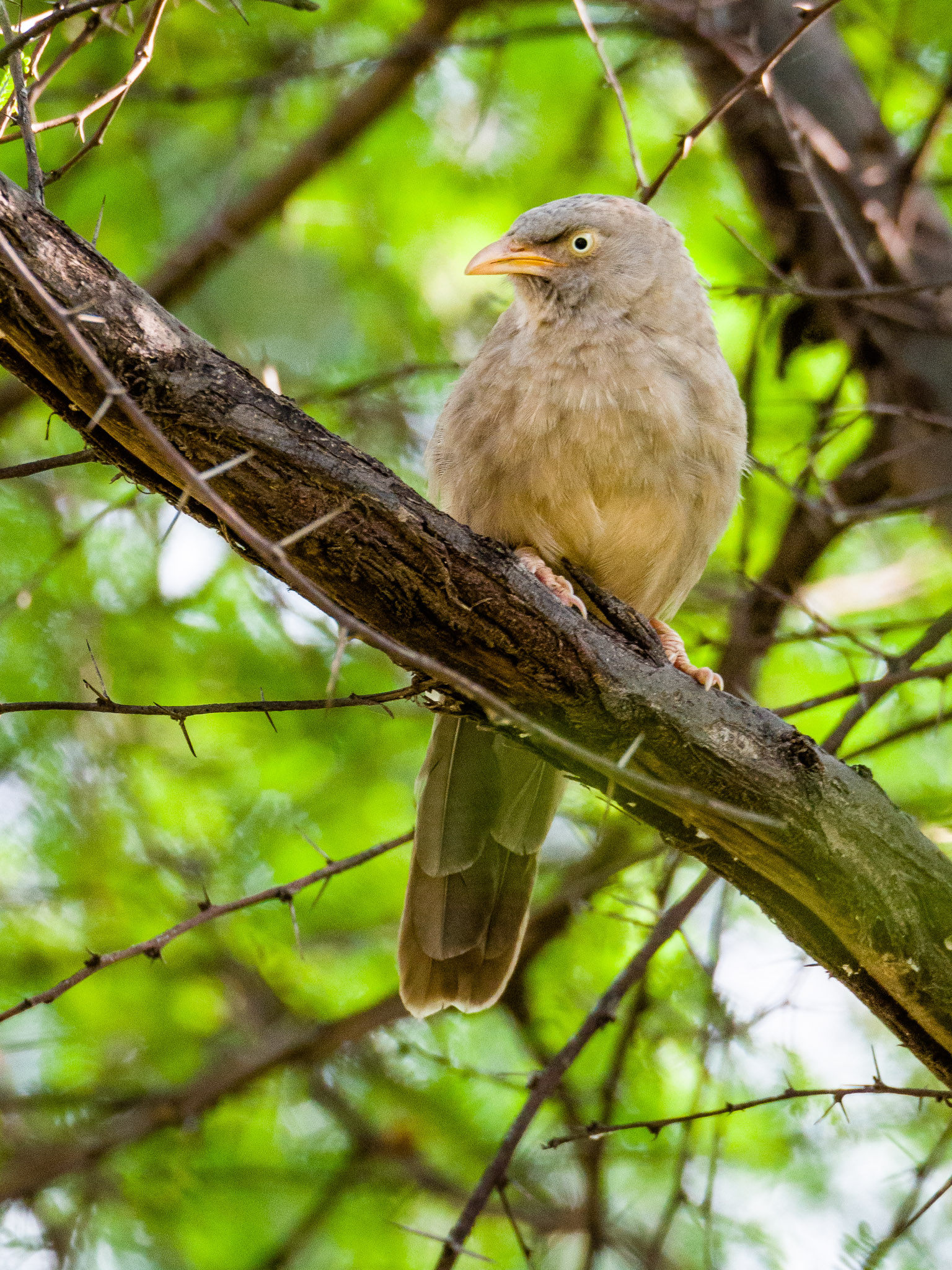 Jungle Babbler